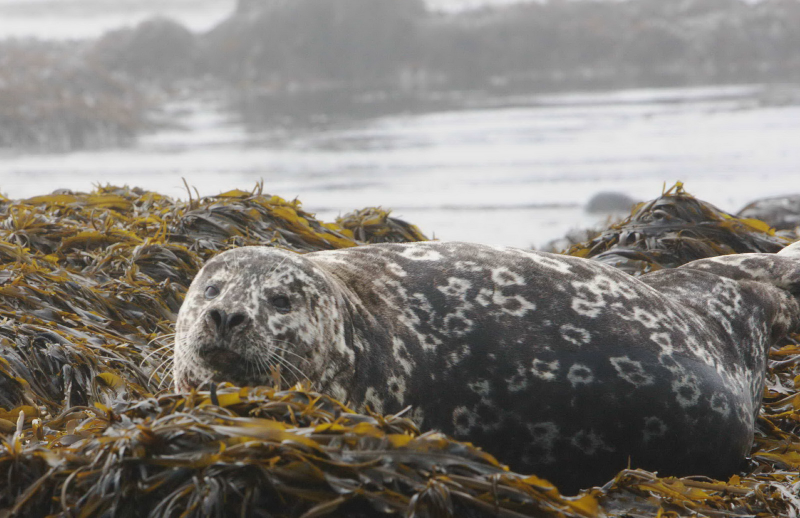 Phoca vitulina stejnegeri